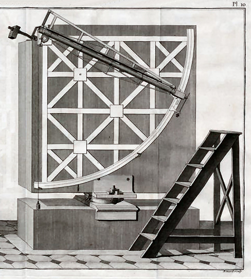 Quart de cercle mural et pouvant tourner de 180°, construit par Bird, adapté et utilisé par Le Monnier.